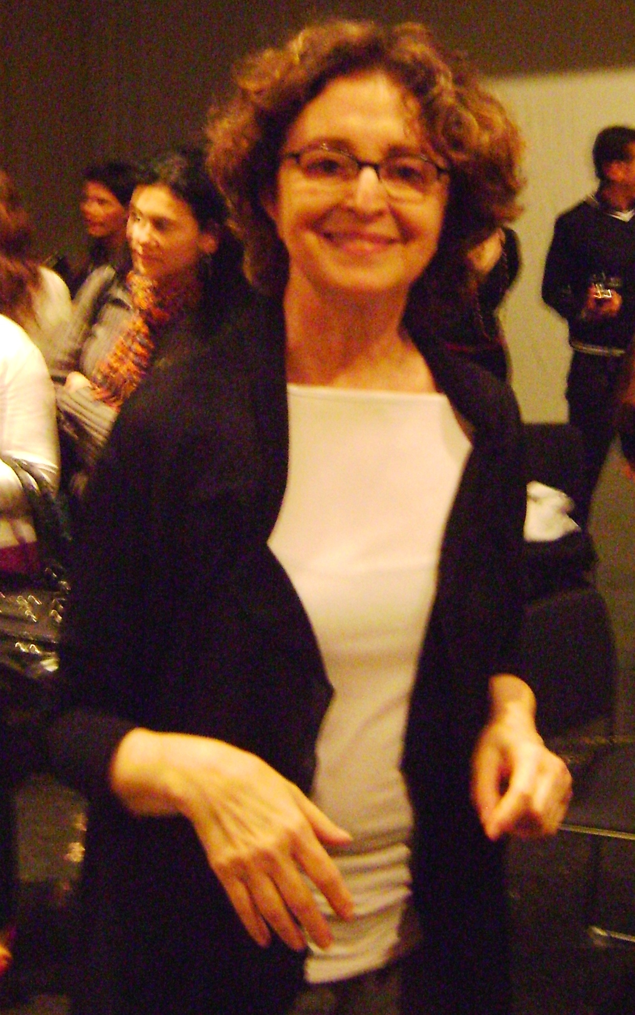 Ana Lúcia Torre, atriz brasileira, ao final da leitura dramática da peça "As Lágrimas Amargas de Petra Von Kant", no SESC-Consolação, em São Paulo, em 26/10/2010.